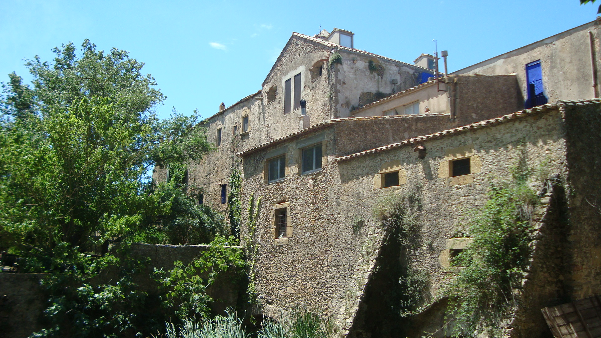 Façana del Molí de Pals